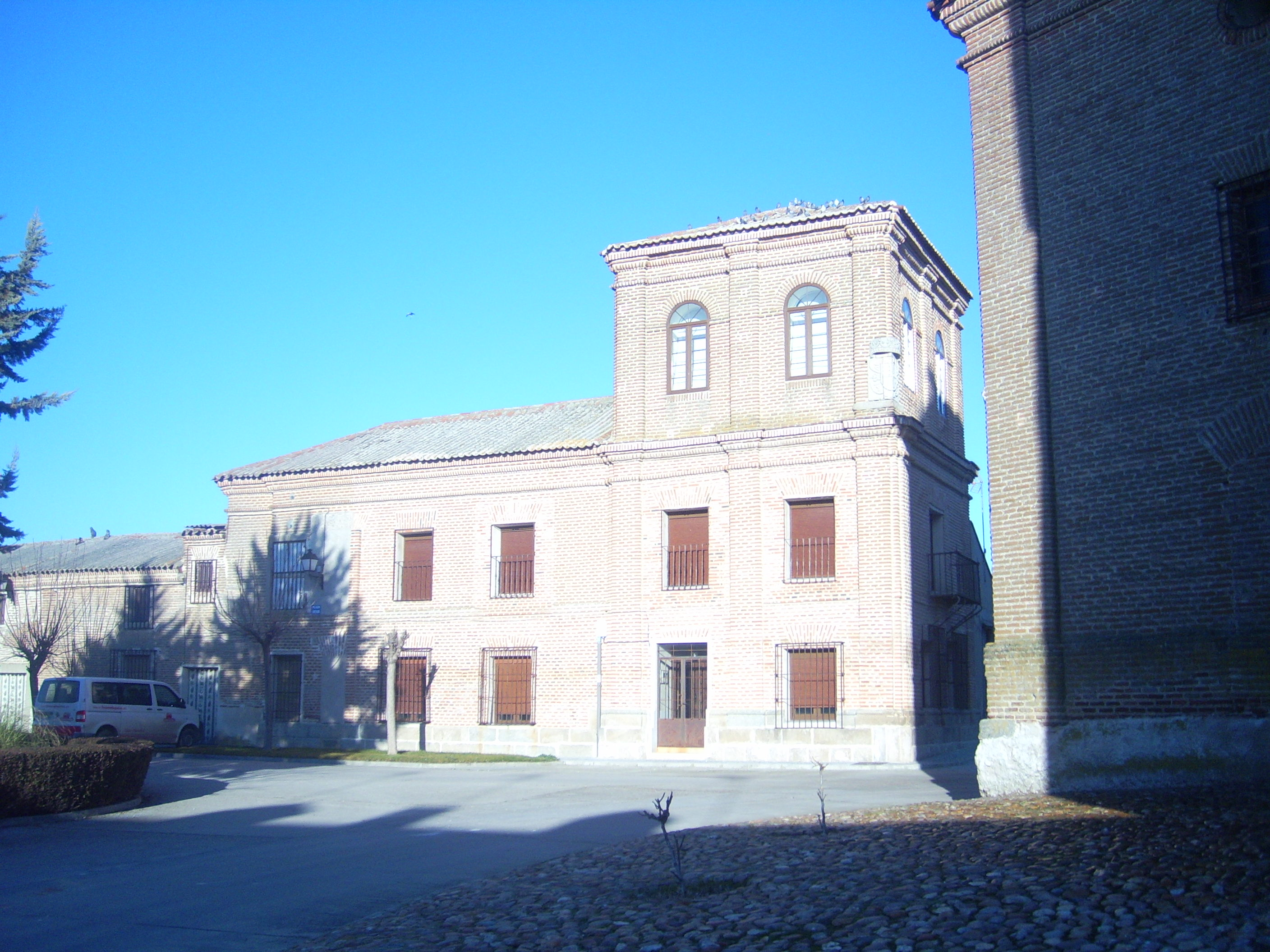 Palacio del Conde de Valdelágila en Fuentes de Año (Ávila).